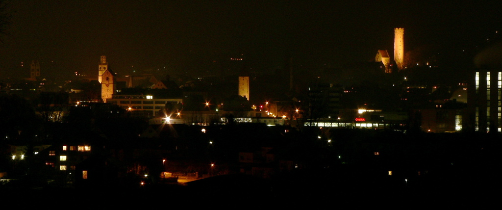 Ravensburg bei Nacht Autor: Michael Meding Quelle: Selbst fotografiert, 2006